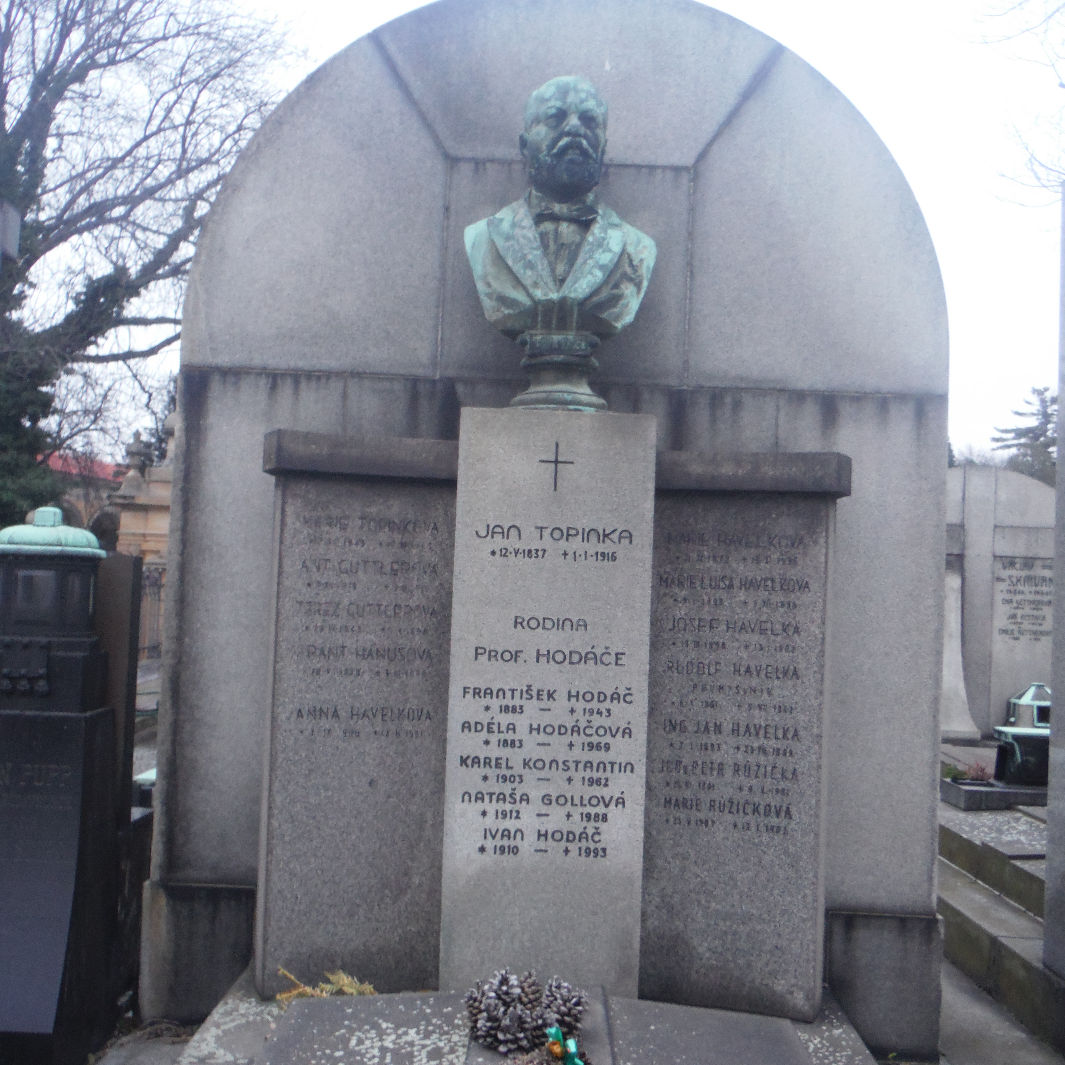 hrob